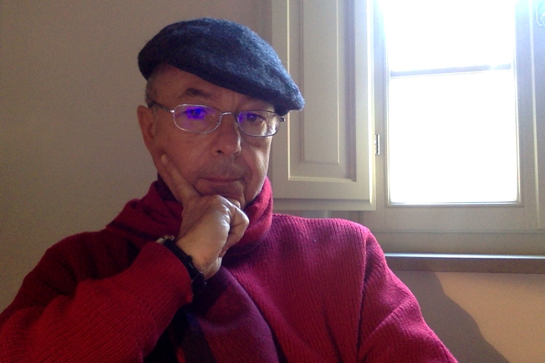 Professor Mario Pezzella